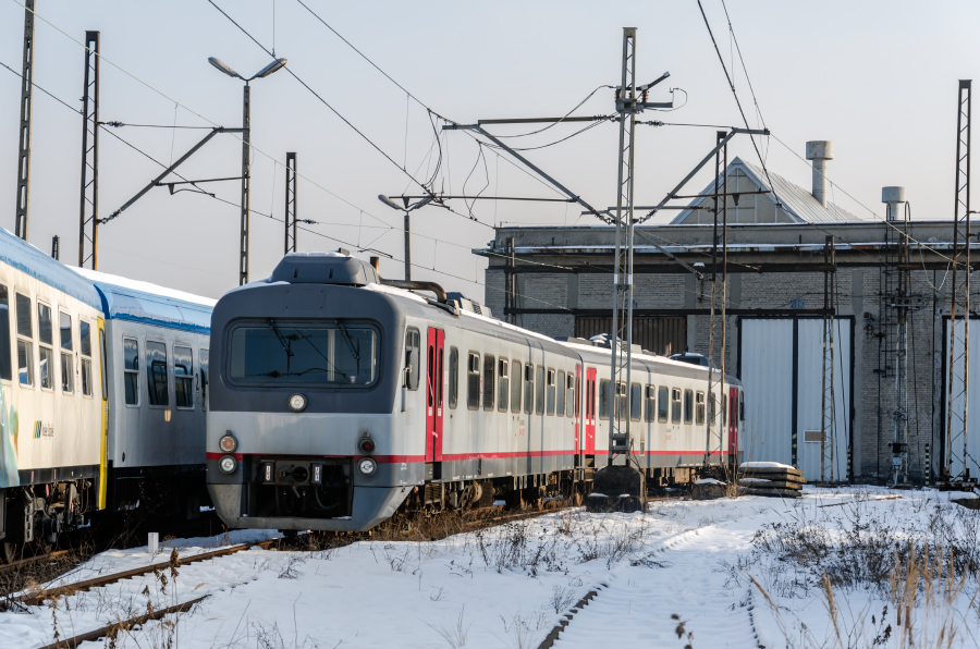 Spalinowy zespół trakcyjny SN83-003 odstawiony na terenie byłego Śląskiego Zakładu Przewozów Regionalnych przy ul. Raciborskiej w Katowicach. Tabor został przejęty przez Komornika Sądowego i oczekuje na licytację komorniczą.